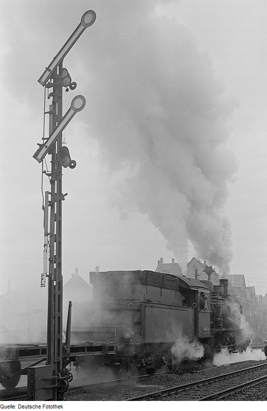 Original image description from the Deutsche Fotothek Dampflok passiert eine Eisenbahn-Signalanlage